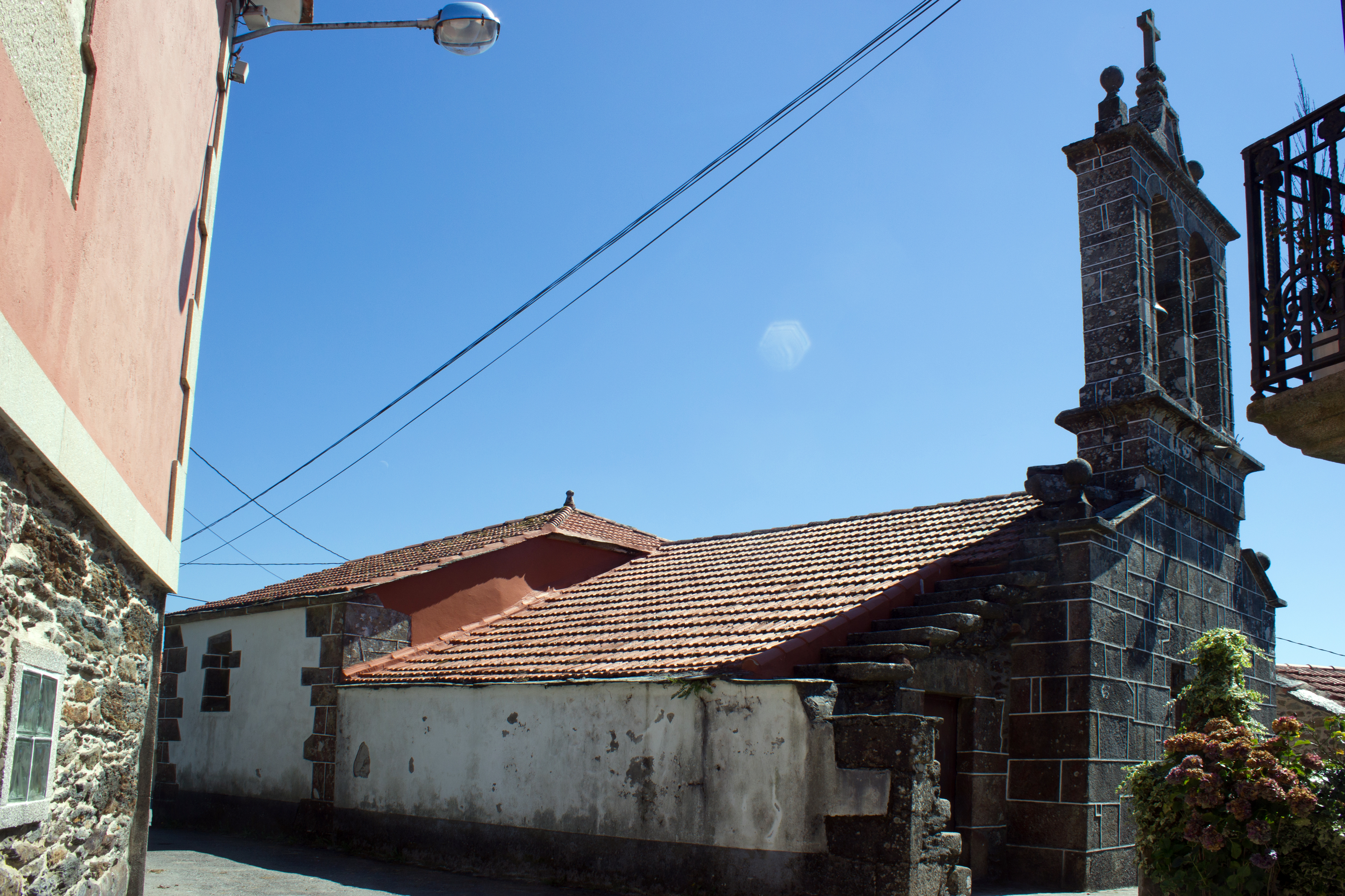 Igrexa de San Nicolao de Ventoxo, no concello de Forcarei.